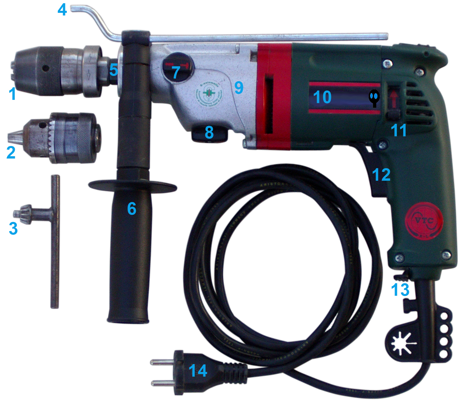 Elektryczna wiertarka ręczna. OPIS: 1. Uchwyt trójszczękowy zaciskany ręką. 2. Uchwyt trójszczękowy zaciskany kluczem. 3. Klucz do uchwytu trójszczękowego 2. 4. Nastawny ogranicznik głębokości wiercenia. 5. Wrzeciono zakończone gwintem ½” UNF. 6. Rękojeść pomocnicza. 7. Przełącznik funkcji udaru. 8. Przełącznik przekładni. 9. Obudowa przekładni. 10. Obudowa silnika. 11. Dźwignia zmiany kierunku obrotów. 12. Przycisk uruchamiania i regulacji prędkości obrotowej wrzeciona. 13. Blokada przycisku 12 do pracy ciągłej. 14. przewód zasilający zakończony wtyczką sieciową. Autor: Ssawka Grafika udostępniona na licencji GFDL